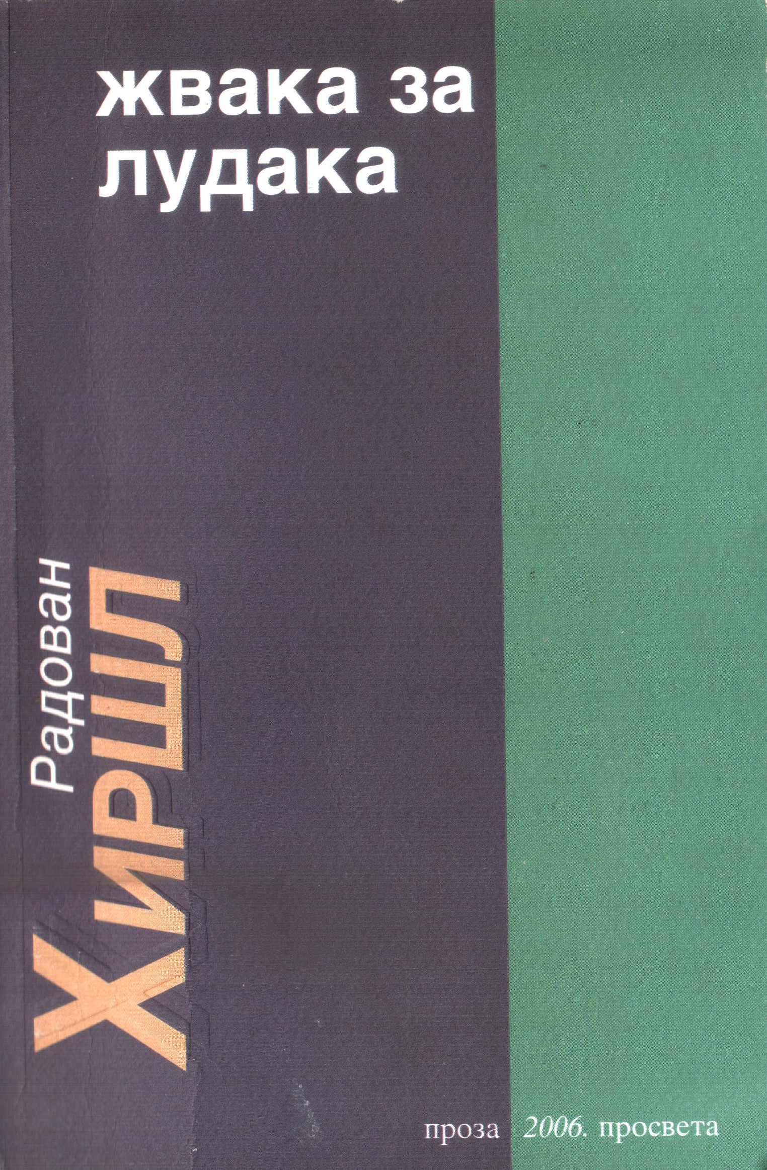 Ovo su korice autobiografije, zbirke priča o beogradskoj umetničkoj sceni, životu Beograda, umetničkim institucijama grada.